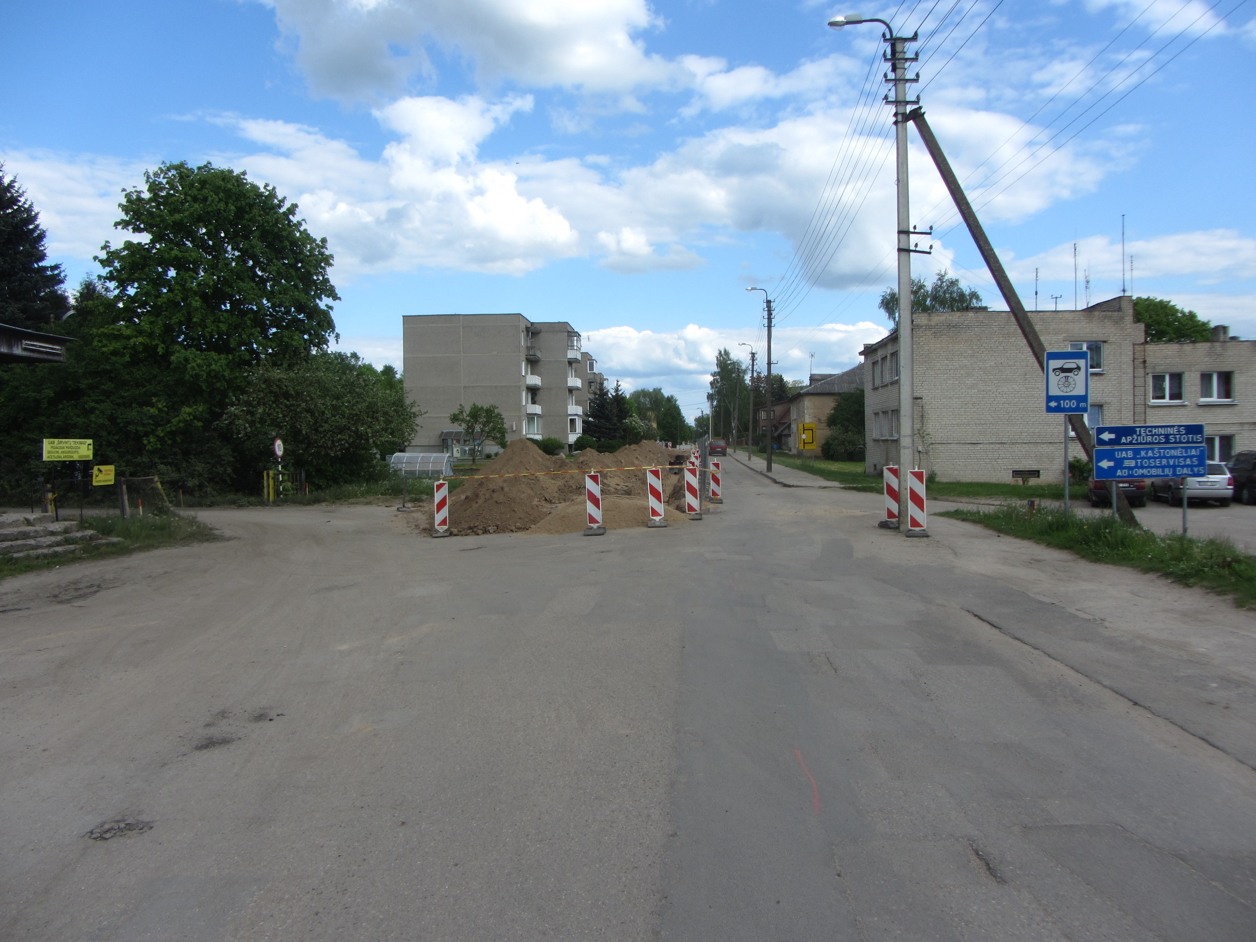 Širvintos, Lithuania